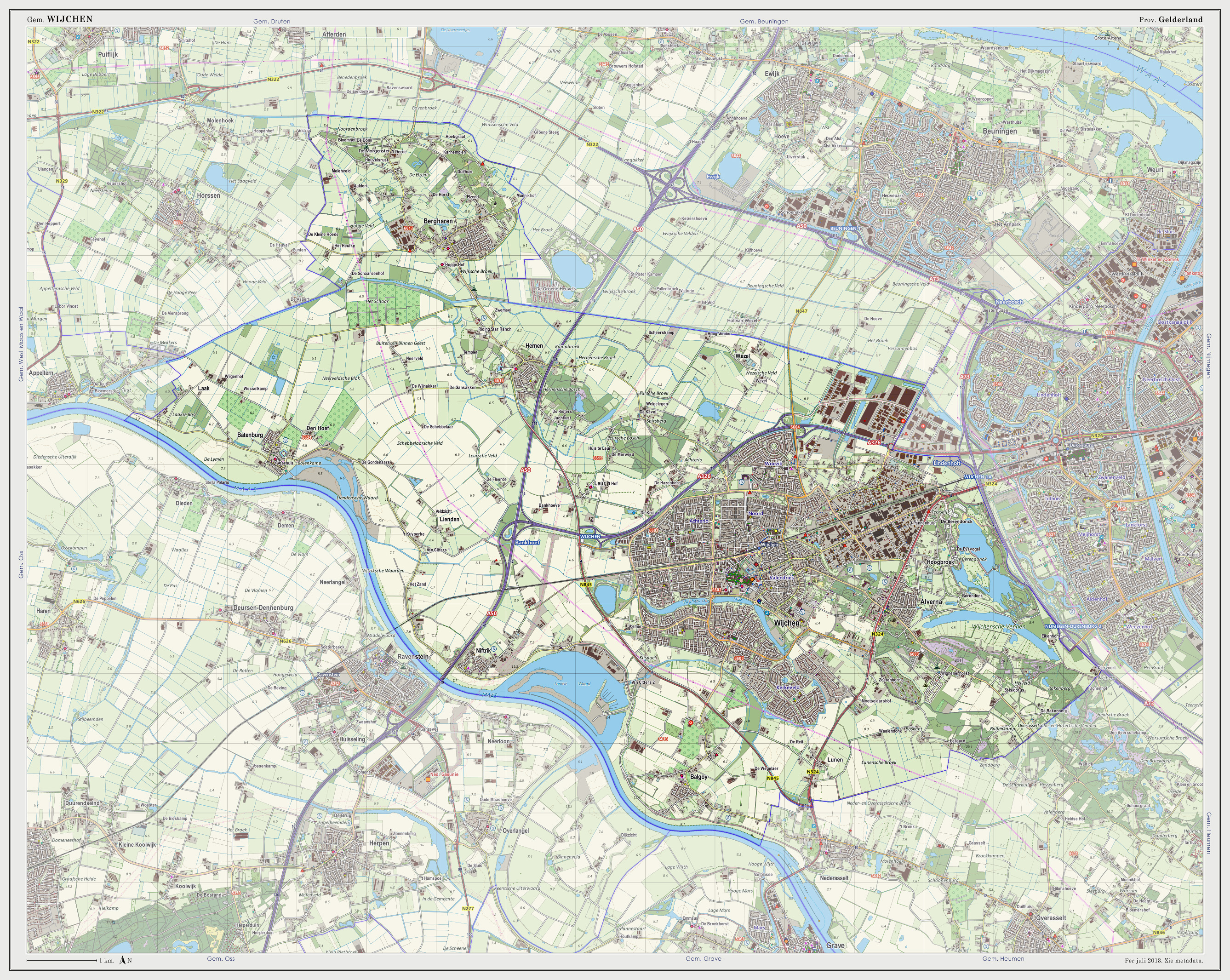 Topografische kaart van gemeente Wijchen (2013). Samengesteld door Jan-Willem van Aalst op basis van de GML open geodata van de BRT/Top10NL (basisregistratie Topografie, Kadaster 2011), vrijgegeven door Kadaster onder de Creative Commons BY licentie. Additionele gegevens uit BAG (8 juli 2013), uit de Open Street Map (9 juli 2013) en uit de Risicokaart. Peildatum kaartbeeld: 9 juli 2013. Zie ook Gemeentenatlas.nl Samenstelling en kleurenschema: Jan-Willem van Aalst, met QuantumGIS en Photoshop. Zie ook de Legenda.